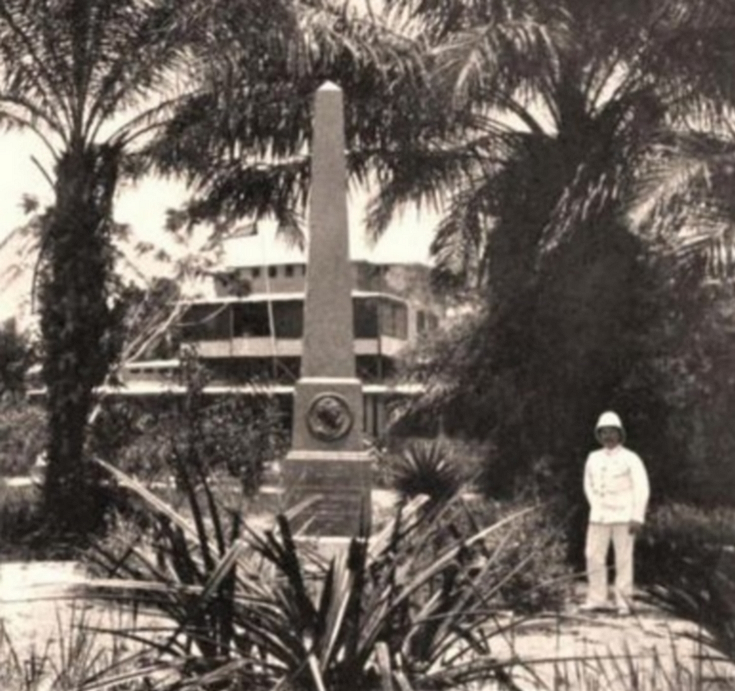 Denkmal für Gustav Nachtigal in Duala, am Sitz der deutschen Kolonialverwaltung von Kamerun. Prof. Ferdinand Wohltmann rechts am Denkmal stehend.